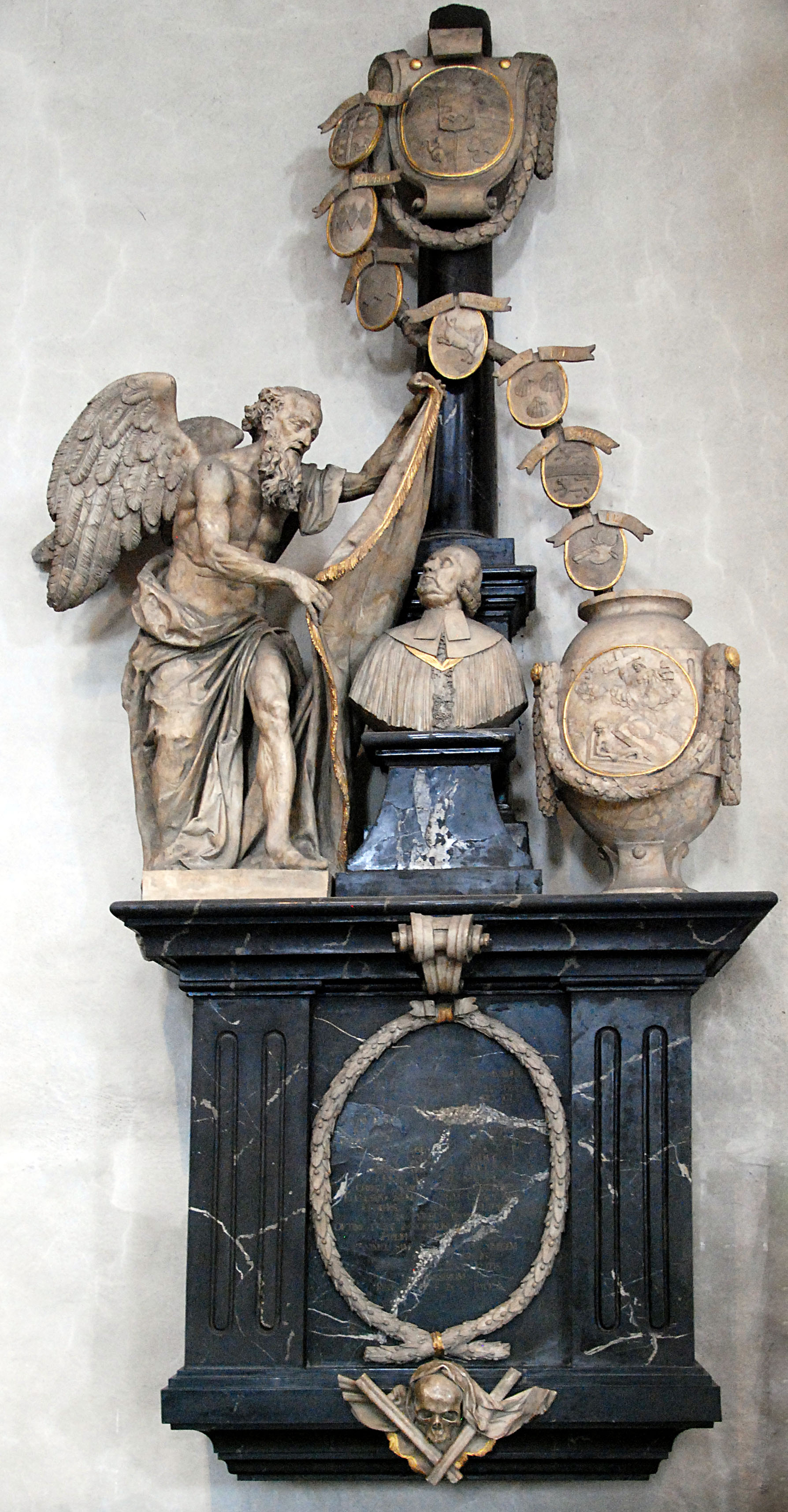 Freiherr Johann Philipp Ludwig Ignaz von Frankenstein (* 28. Juli 1700; † 14. April 1780 in Würzburg) war Würzburger Domherr und Präsident des würzburgischen Oberen Rats sowie kaiserlicher Geheimer Rat.